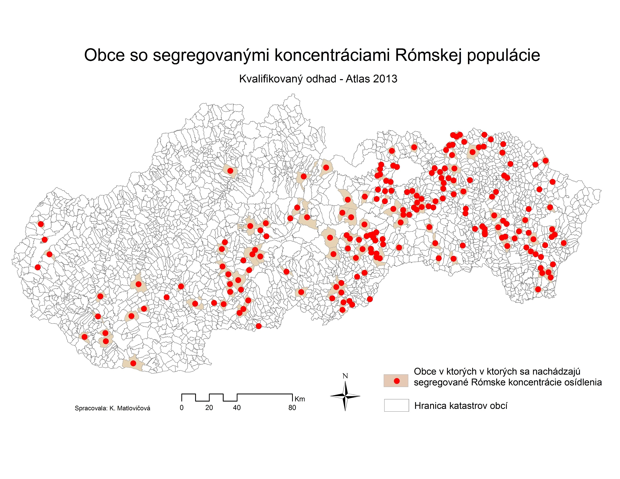 Segregované koncentrácie Rómov na Slovensku v roku 2013